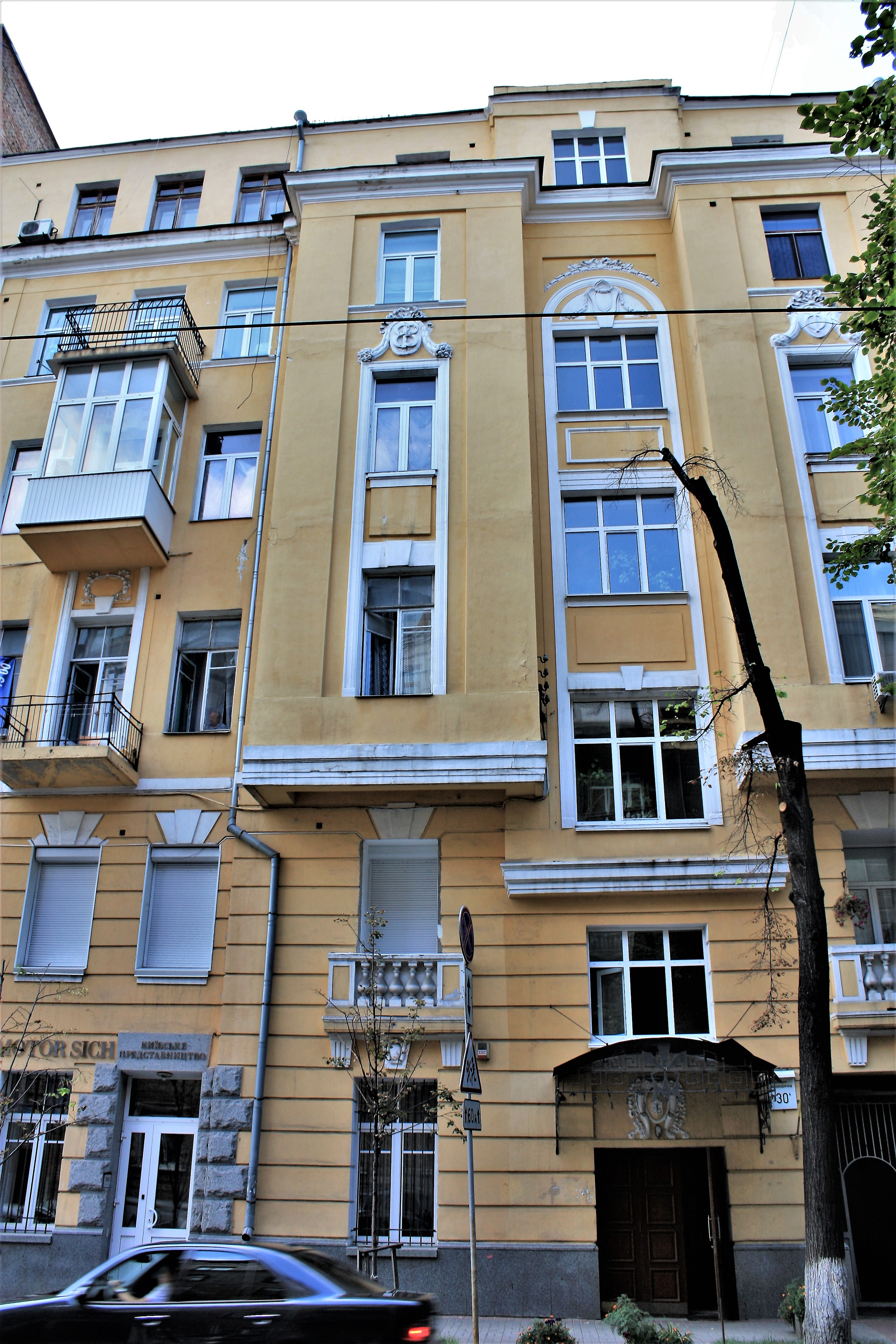 Київ, вулиця Шовковична, 30